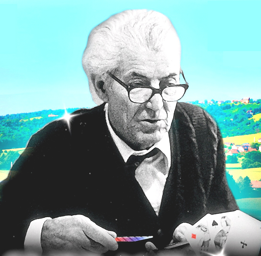 Foto: Westreicher